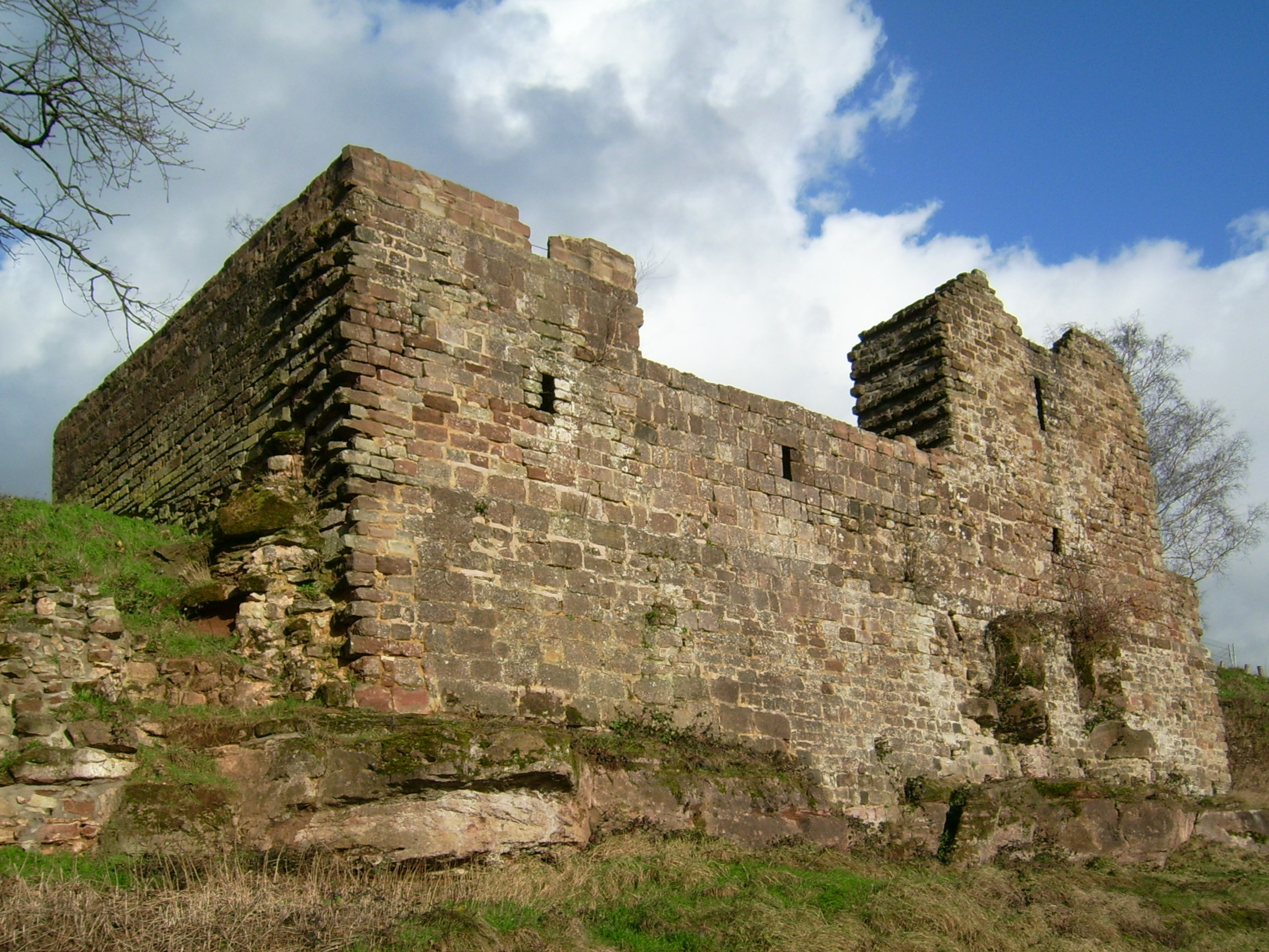 Siersburg Außenmauer